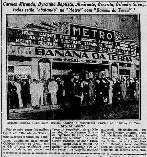 Divulgação do filme Banana da Terra (1939), no jornal Diário Carioca em 15 de Fevereiro de 1939